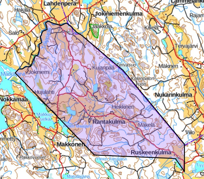 Märkäjärvenmaan alue piirrettynä nykykartalle vuoden 1781 isojakokartan pohjalta